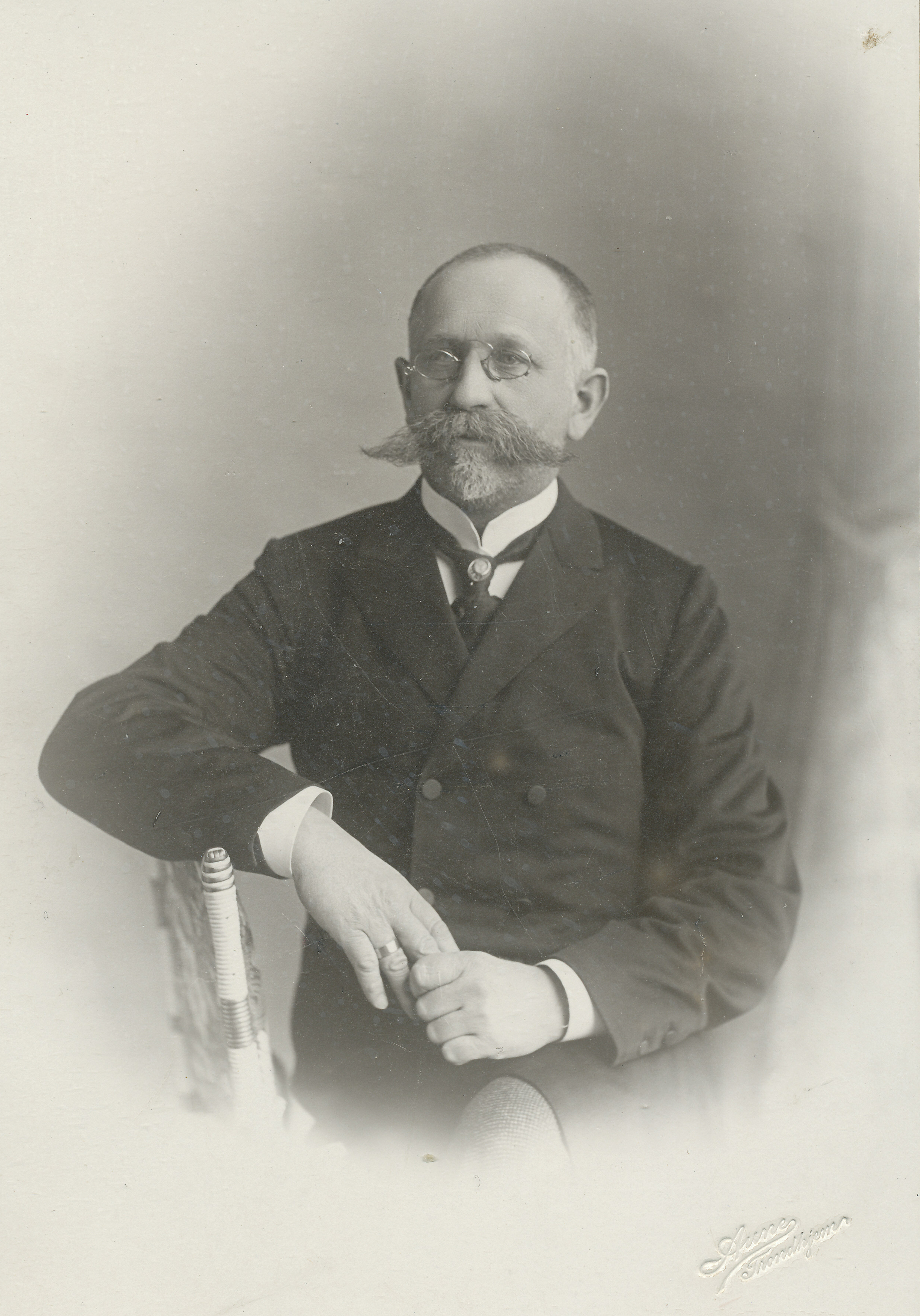 Format: Fotopositiv Dato / Date: Ukjent Fotograf / Photographer: Aune Sted / Place: Trondheim Lenke / Link: Trondhjems Mekaniske Værksted (Wikipedia) Lenke / Link: Hans Georg Jürgens' husstand i Wessels gate 5 (Folketellingen 1900, Digitalarkivet) Eier / Owner Institution: Trondheim byarkiv, The Municipal Archives of Trondheim Arkivreferanse / Archive reference: Tor.H41.B26.F1980 Portrettbilde av admistrerende direktør ved Trondhjems Mekaniske Værksted, Hans Georg Jürgens. Han ble født i Egersund i 1855 og døde i Trondheim i 1927. Han ble ansatt som teknisk bestyrer ved TMV i 1888 og ble admistrerende direktør i 1900. Gift med Tyra Vedeler, datter av bergenser og overlærer ved Trondheim Katedralskole, Christian Fredrik Vedeler. Jürgens ledet og planla arbeidet med å oppføre TMV i Rosenborgfjæra, et arbeid som startet opp i 1900. Han drev fra 1902 en teknisk konsulentforretning sammen med sønnen Reidar, som ble uteksaminert fra Trondhjems Tekniske Læreanstalt i 1912. Far og sønn drev firmaet fra Avant Garden-gården.